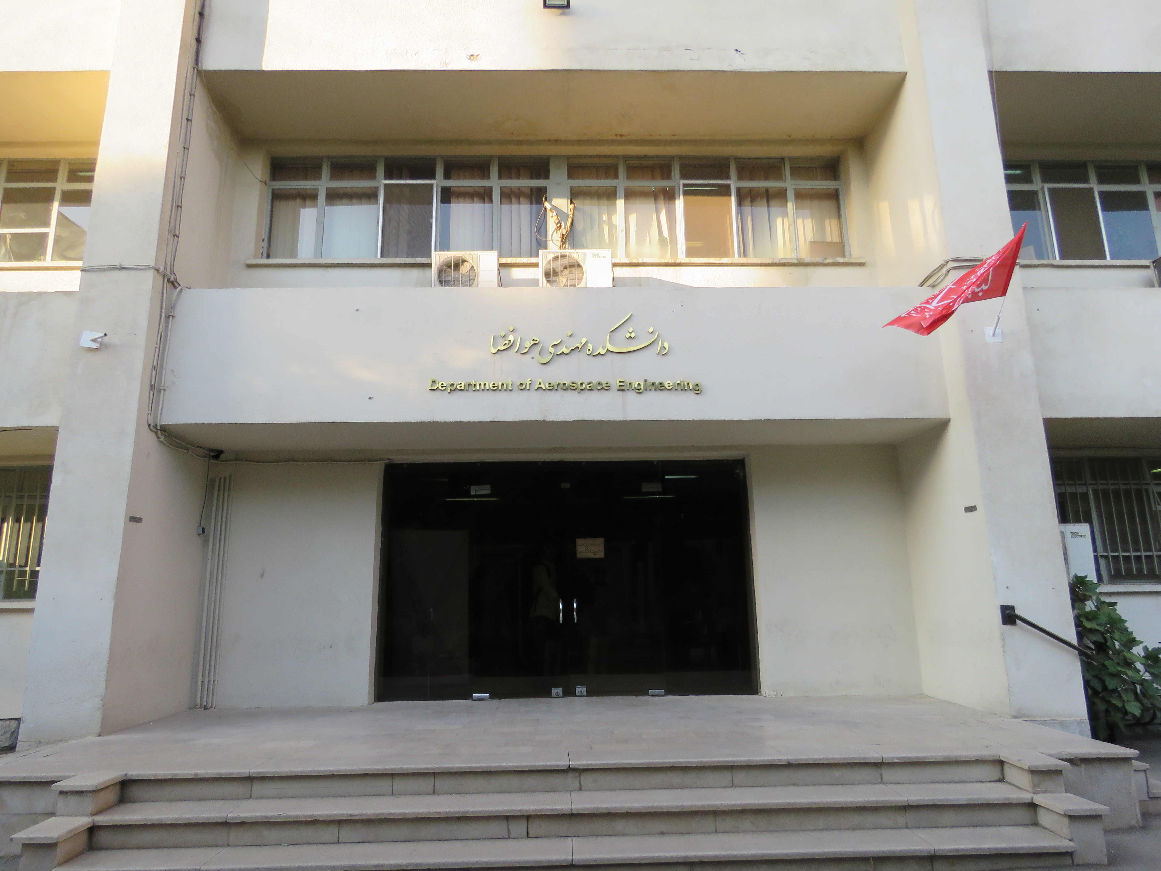 این عکس ساختمان دانشکده هوافضای صنعتی شریف است. این ساختمان قدیمی دانشکده است. این عکس توسط خودم گرفته شده است.